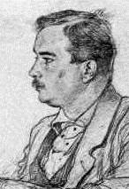 Christian Wilhelm Allers (1857-1915), Selbstportrait (1894), Detail.